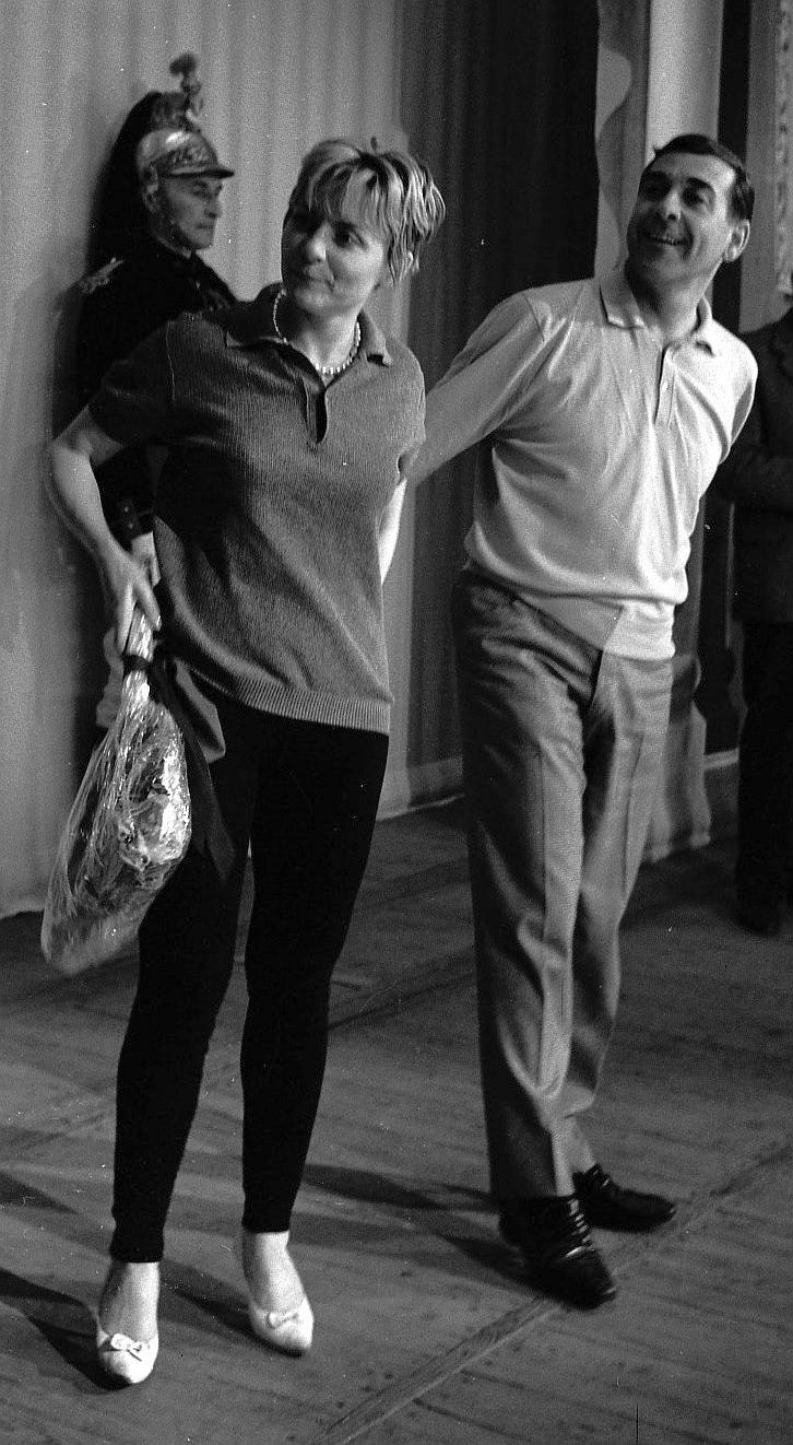 Théâtre du Capitole. Le 6 mai 1964. Vue d'ensemble des coullises sur scène avec de gauche à droite, la chanteuse Annie Cordy et le chanteur Luis Mariano, lors de la répétition de l'opérette "Visa pour l'amour".